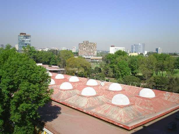 Vista panorámica de la UNAM, desde la Facultad de Ingeniería El edificio de la extrema izquierda en el fondo es la torre de Rectoría, le sigue hacia la derecha la Bilbioteca Central. Esta foto fue tomada por mi, y la paso a dominio público. Categoría:México (imagen)